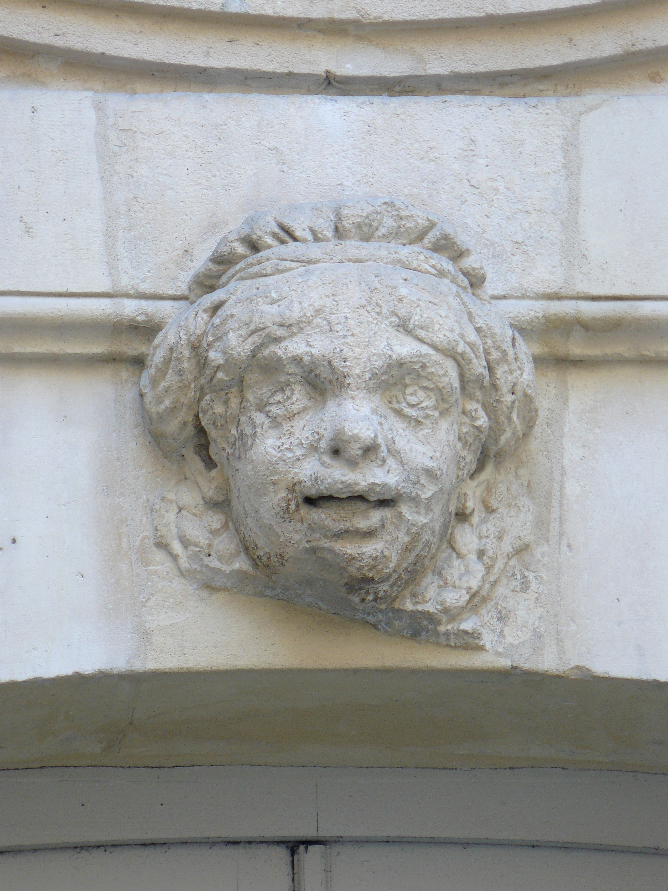 Hôtel de Beauvais (68, rue François-Miron, Paris, 4e arrondissement), mascaron sur les arcades de la cour d'honneur. Ce mascaron est réputé représenté la première propriétaire de l'hôtel, Catherine Bellier qui était laide.